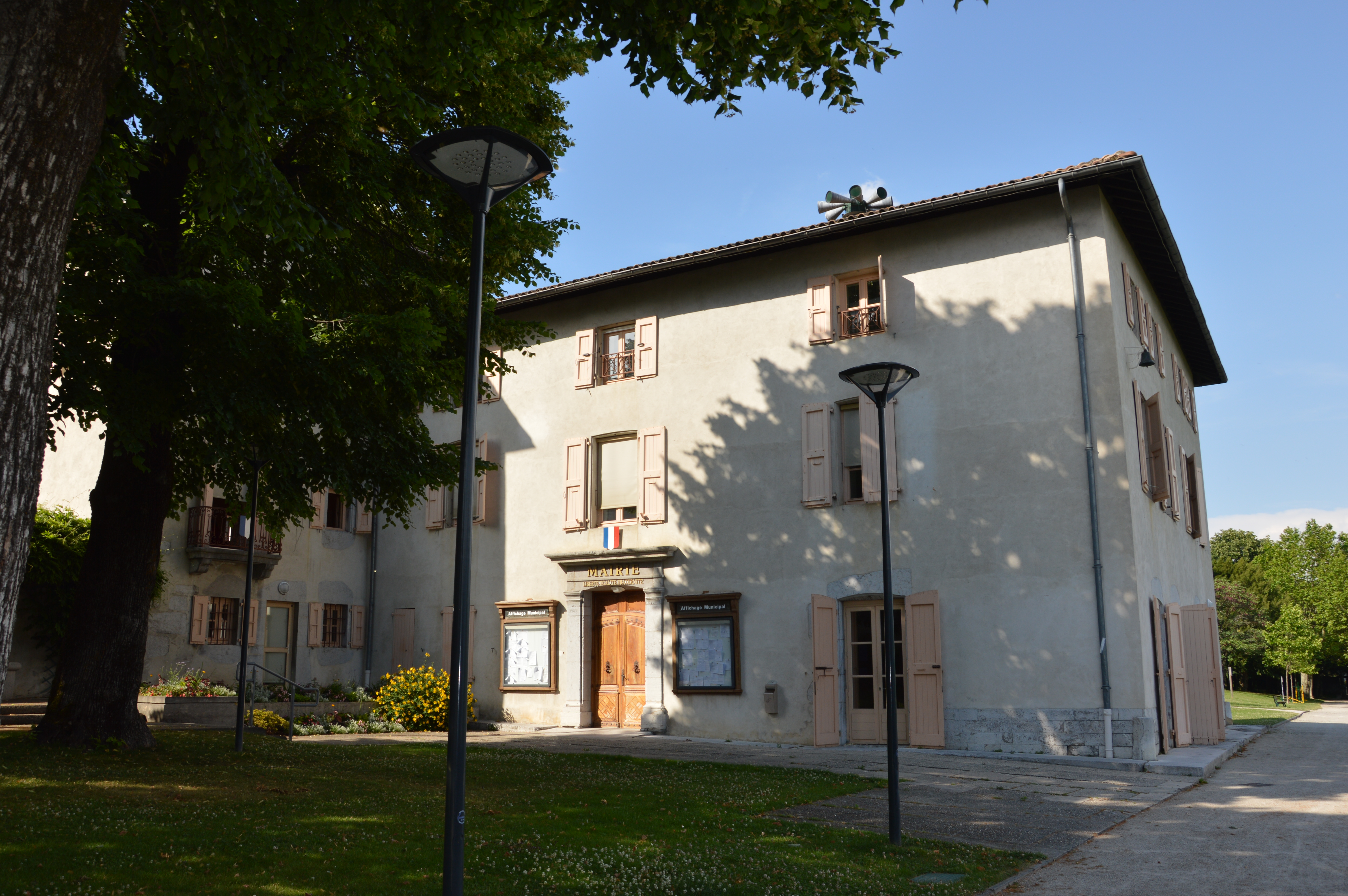 Mairie de Saint-Ismier